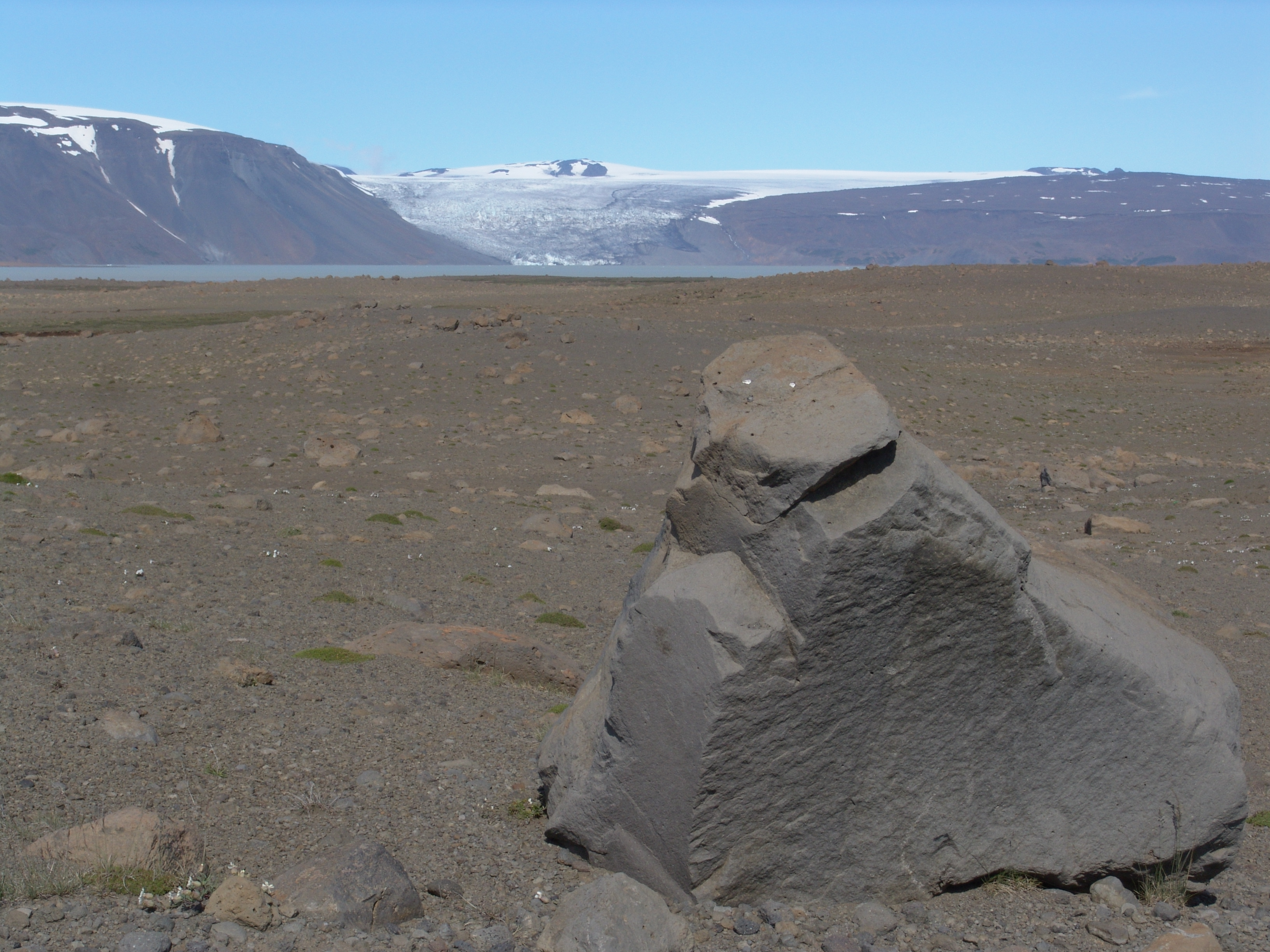 Island, Landschaft.